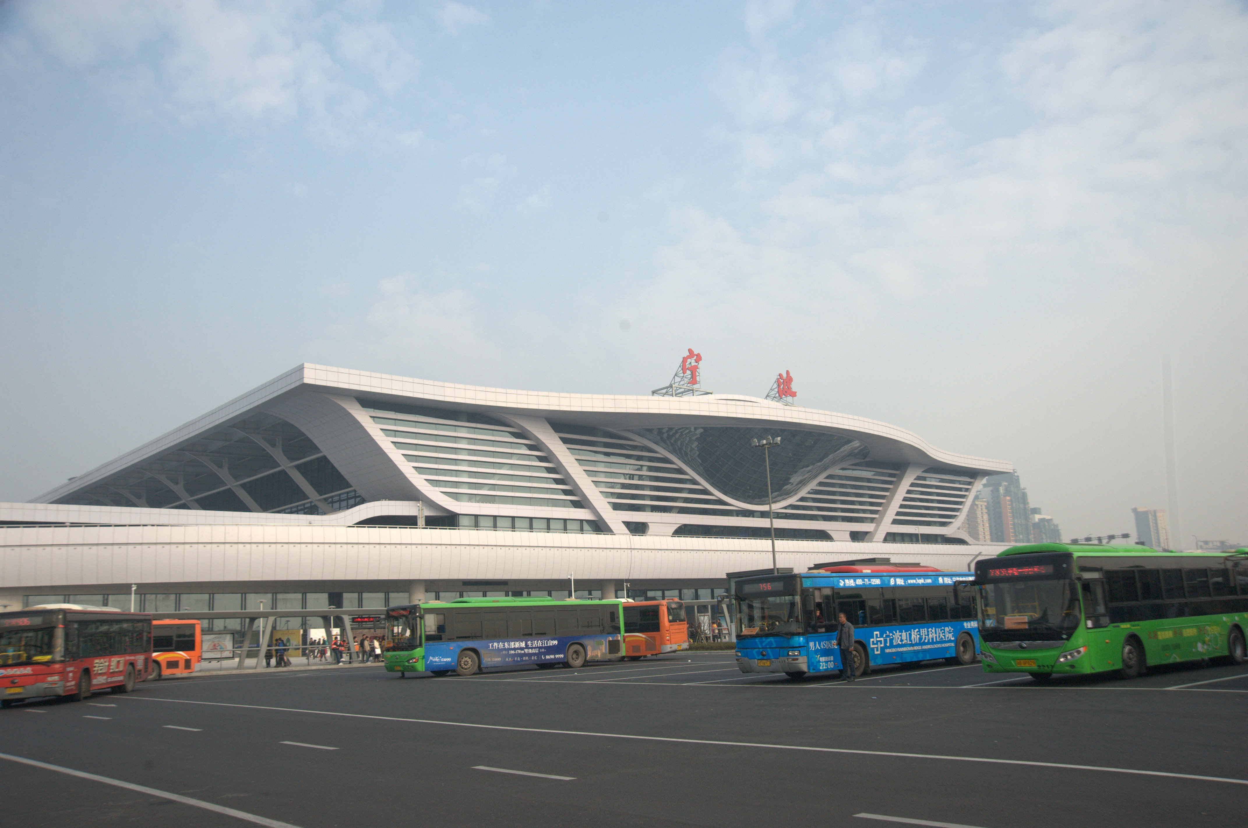 宁波站和公交站场